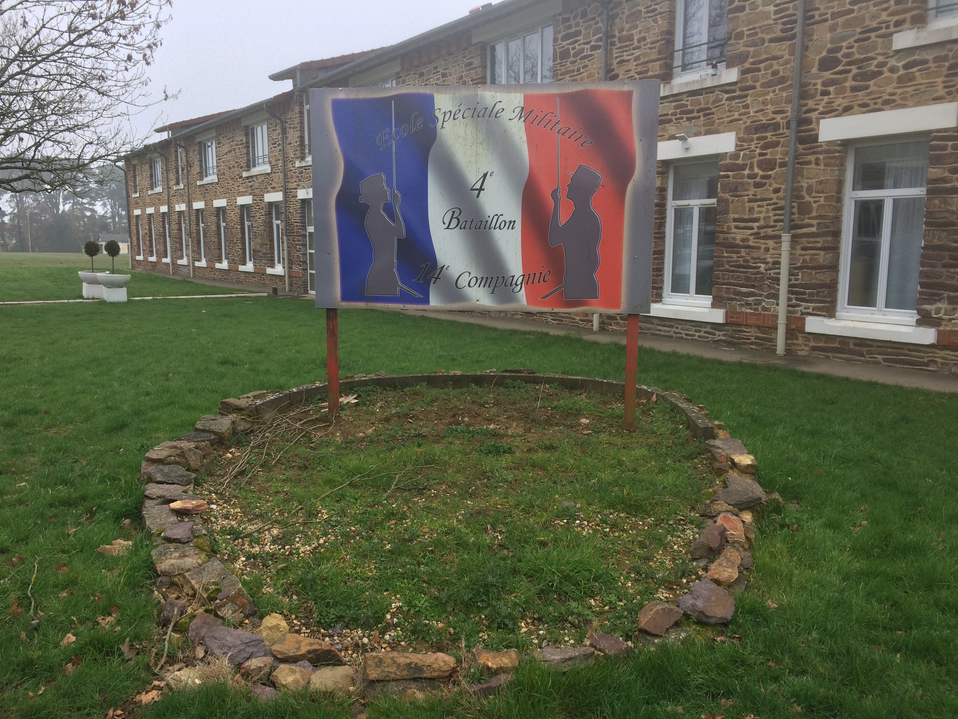 Entrée et bâtiment de la 14e compagnie du 4e Bataillon de l'ESM de Saint-Cyr Coëtquidan en 2019